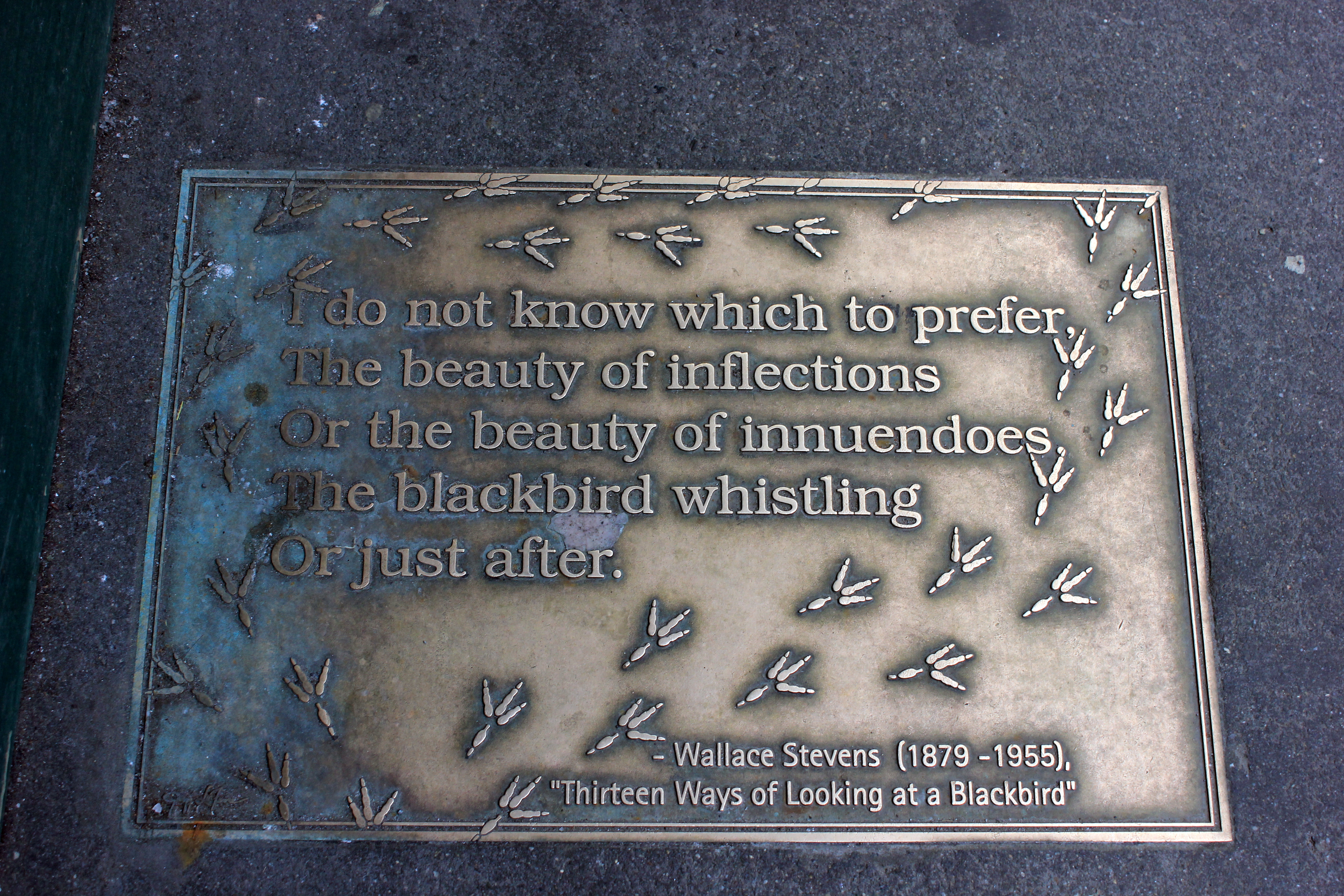 Library Walk New City